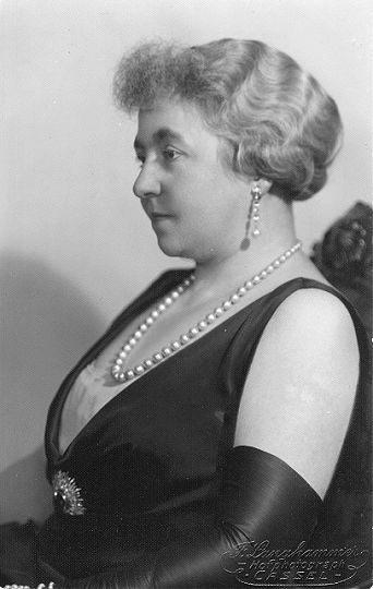 Kaiserin Hermine von Preussen.